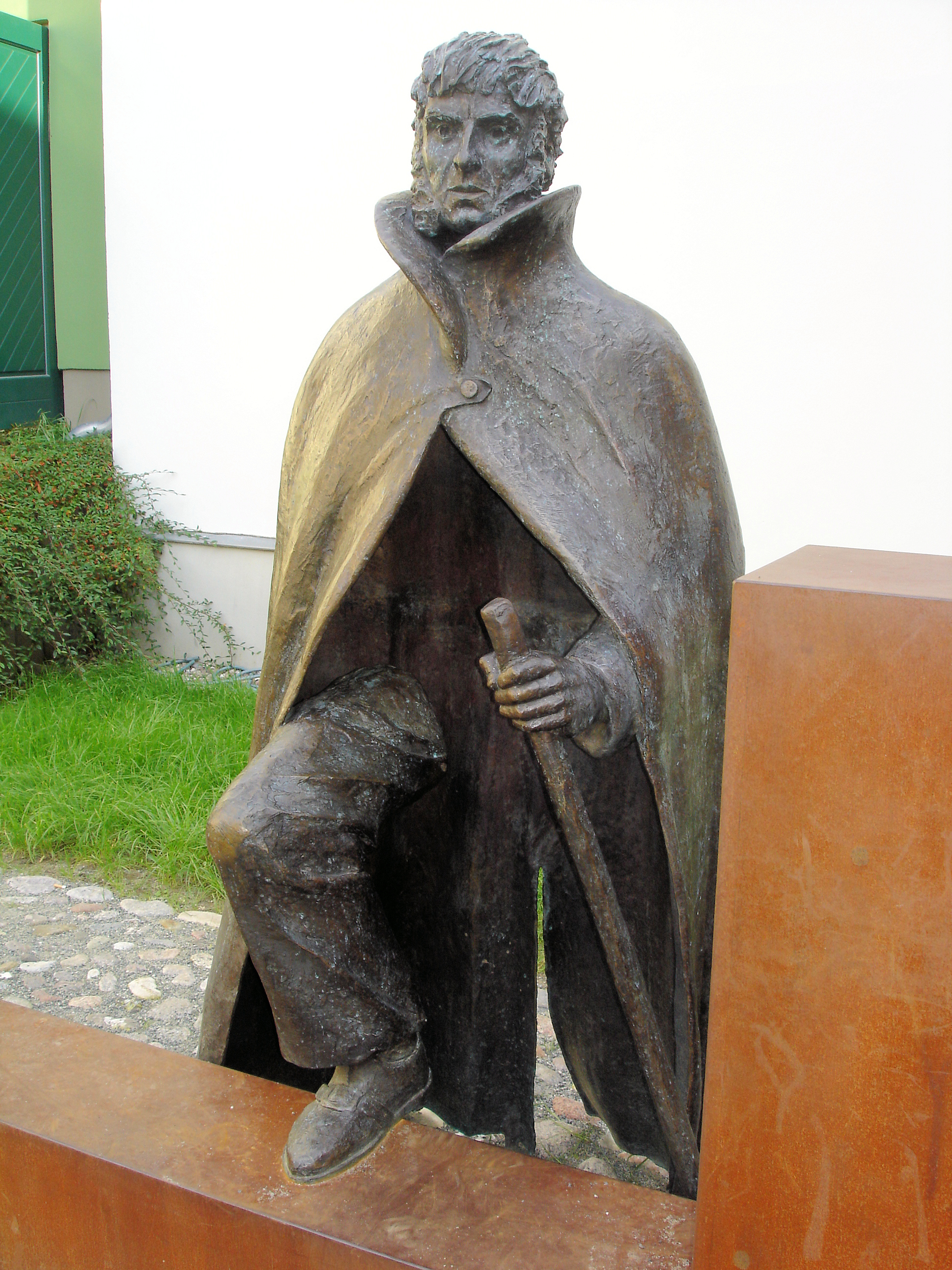 Caspar David Friedrich-Denkmal Greifswald